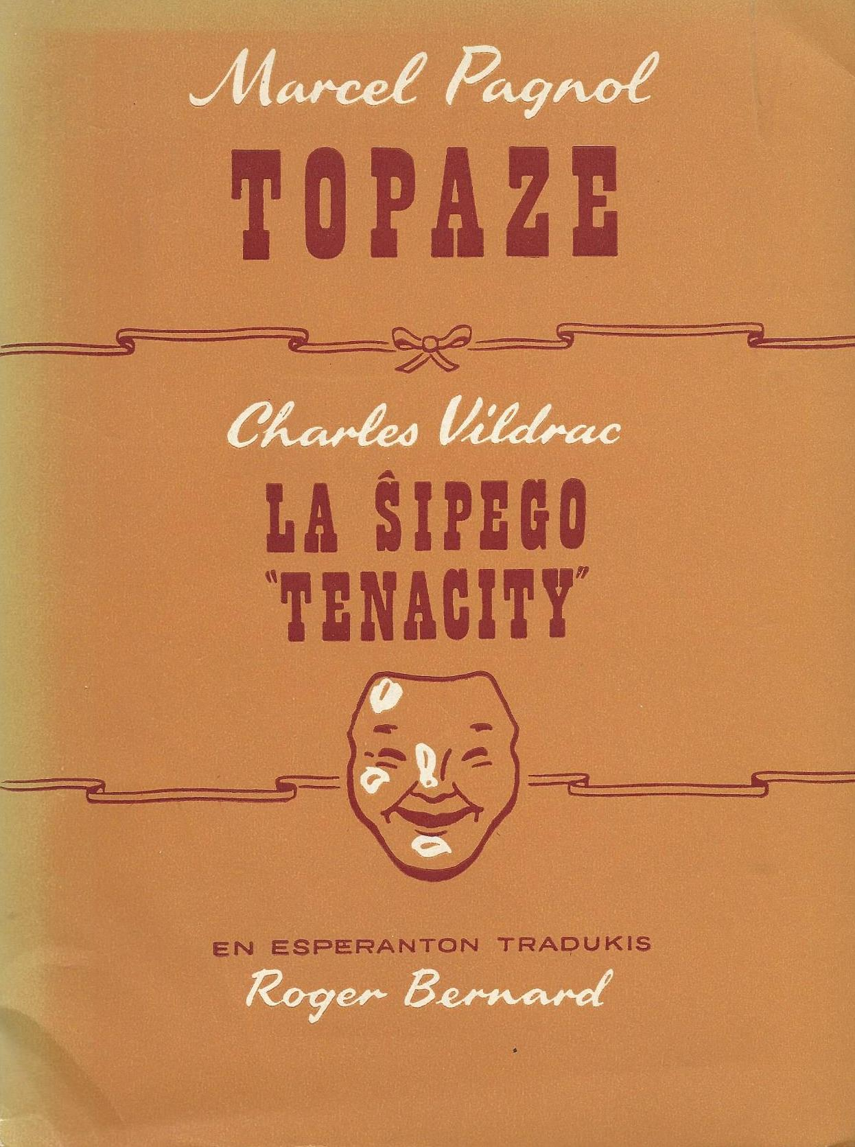 librokovrilo de "Maksimoj", 1960